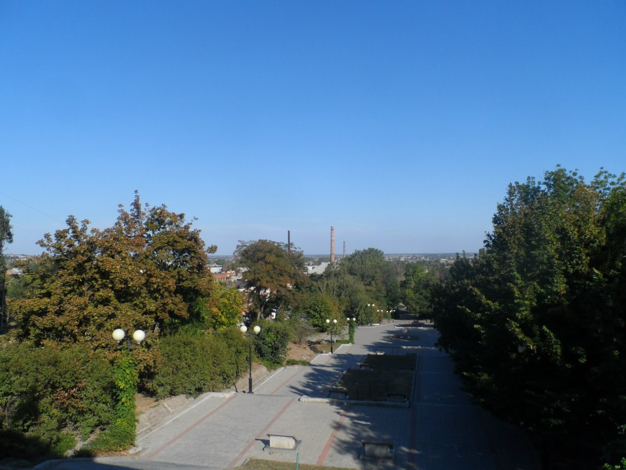 Лестница вниз улицы, возле пл. Победы